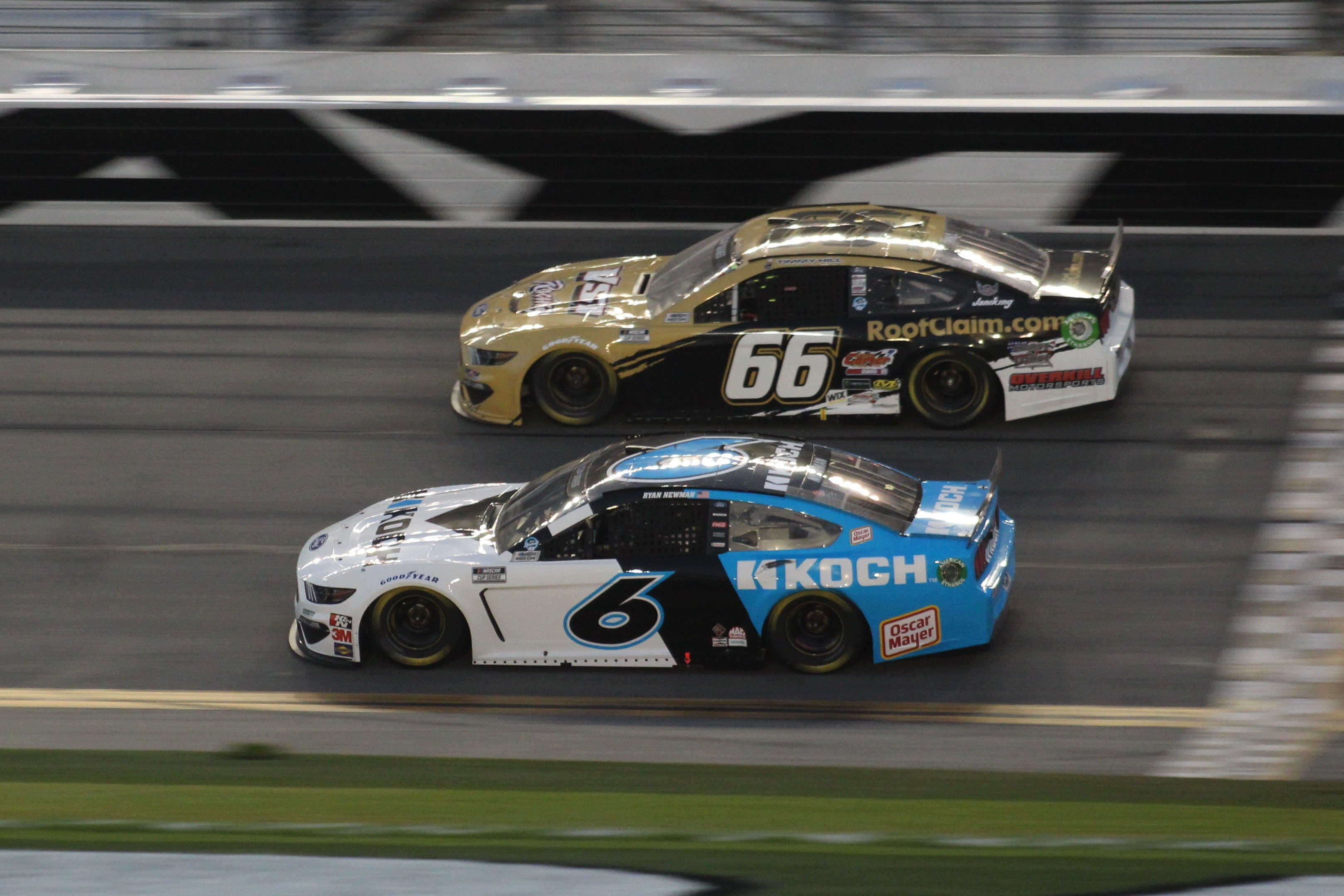 Daytona Speekweeks, 2020